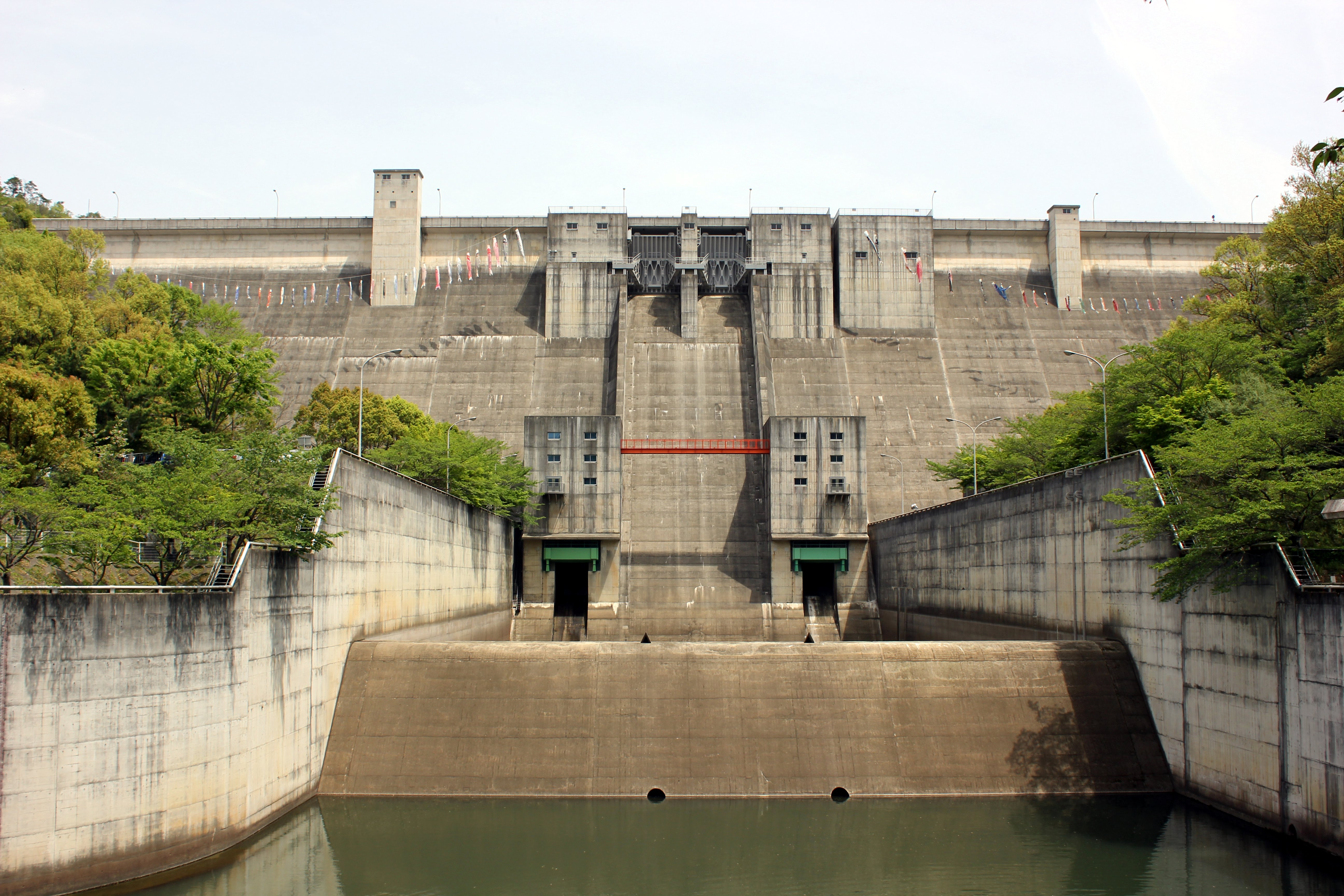 一庫ダム（兵庫県川西市。淀川水系一庫大路次川。水資源機構管理）